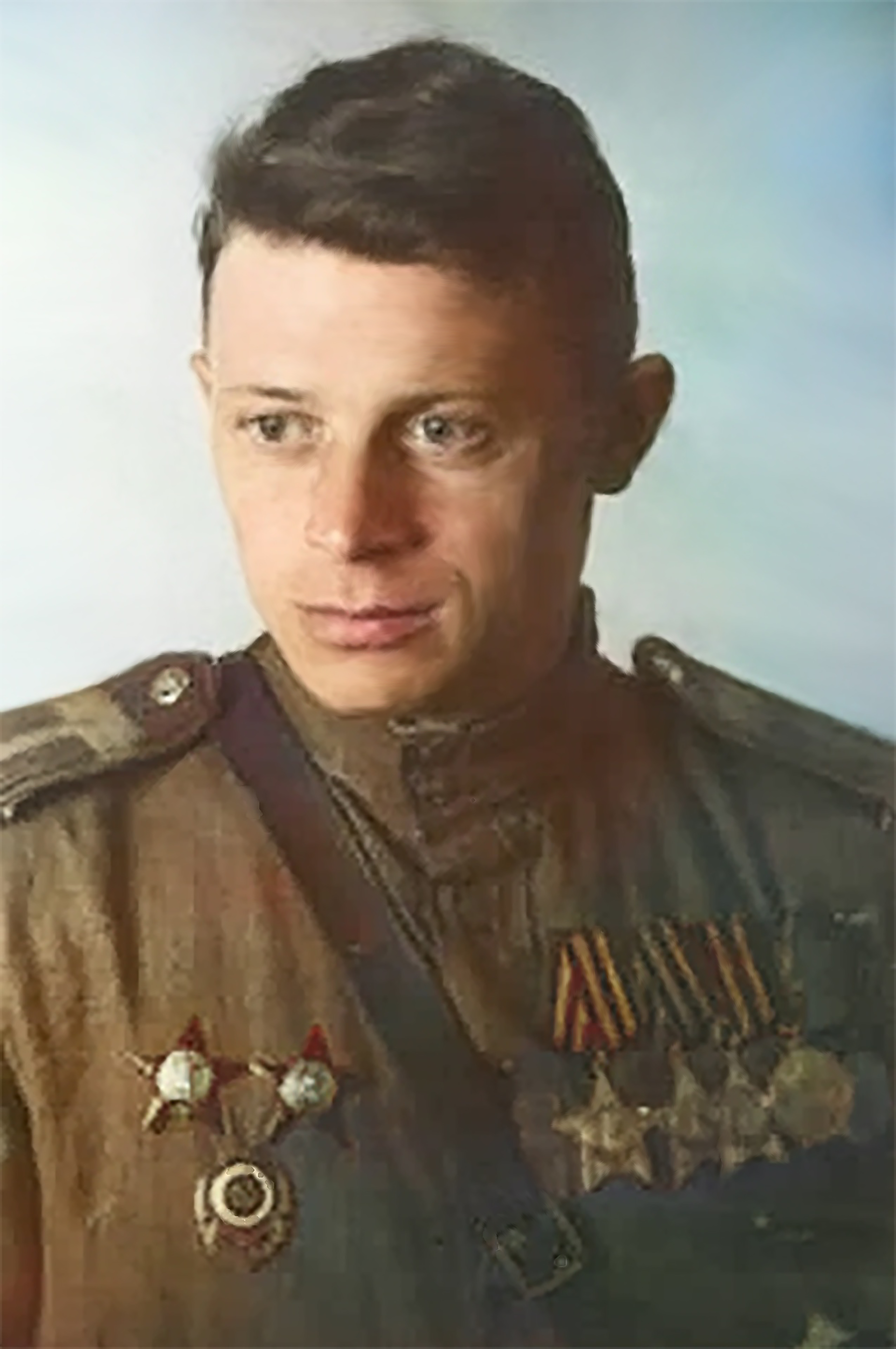 Салтыков, Аркадий Алексеевич